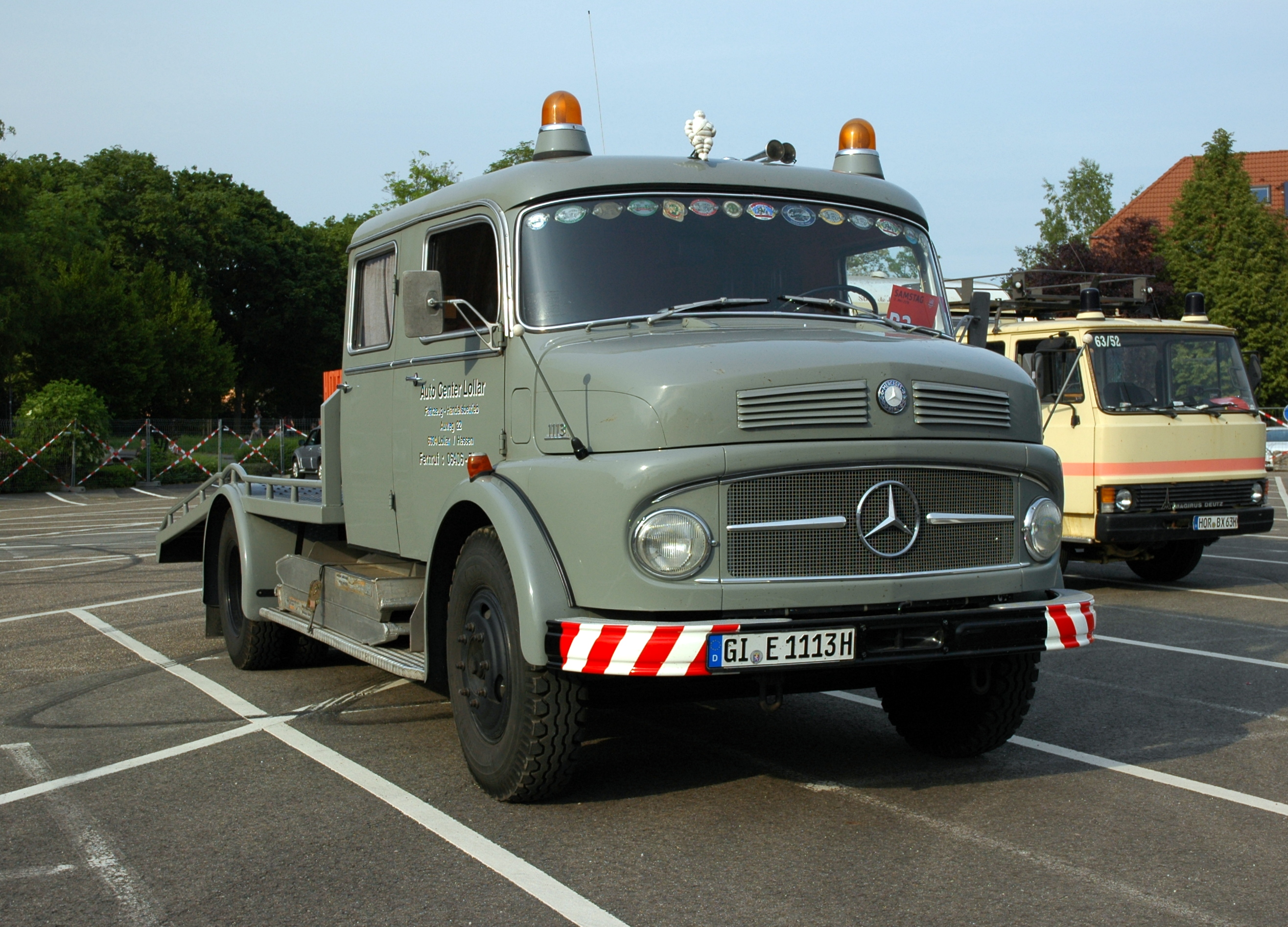 Speyer - Brazzeltag 2018